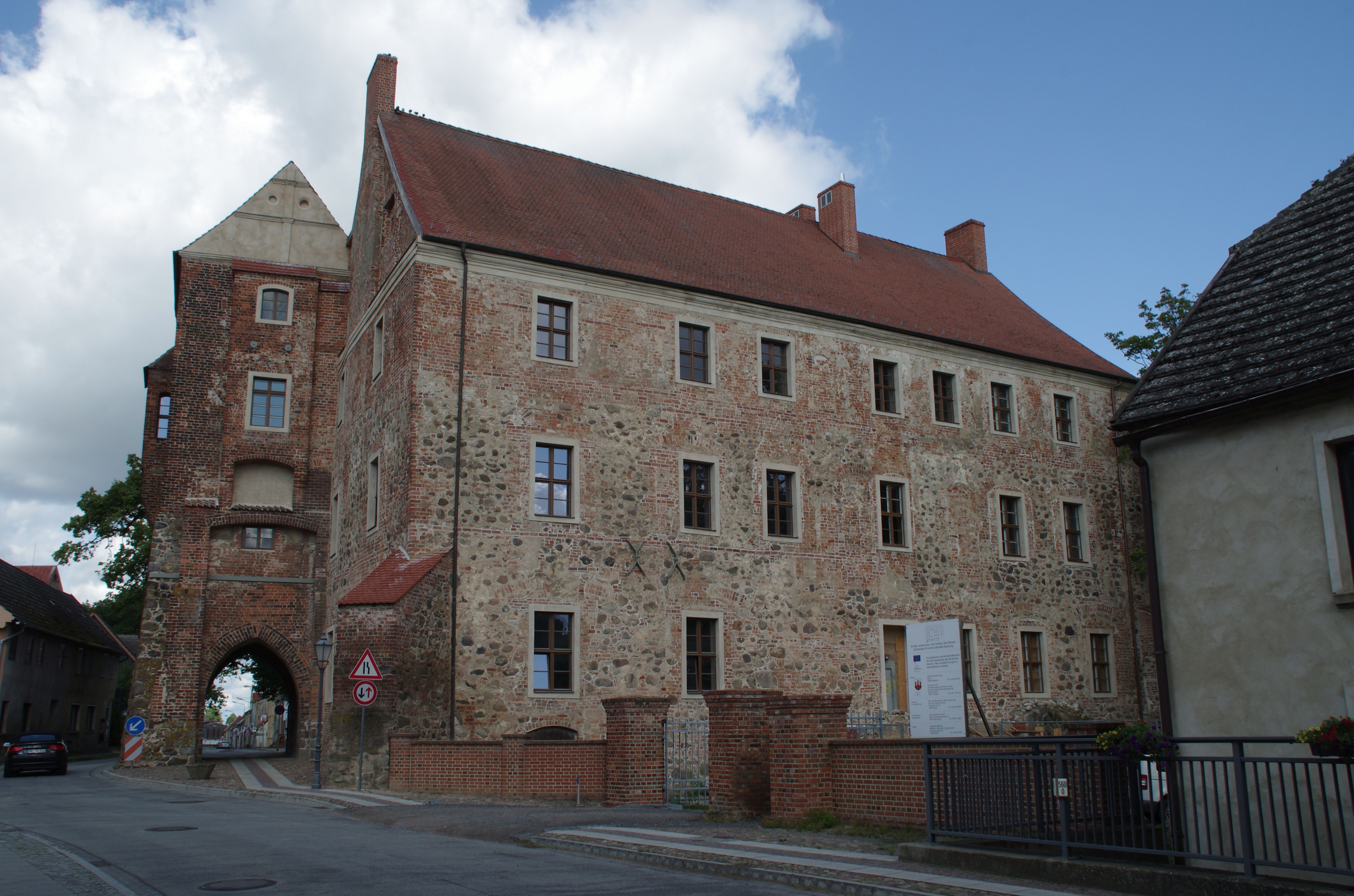 Wittstock/Dosse Ortsteil Freyenstein. Das Haus steht unter Denkmalschutz.